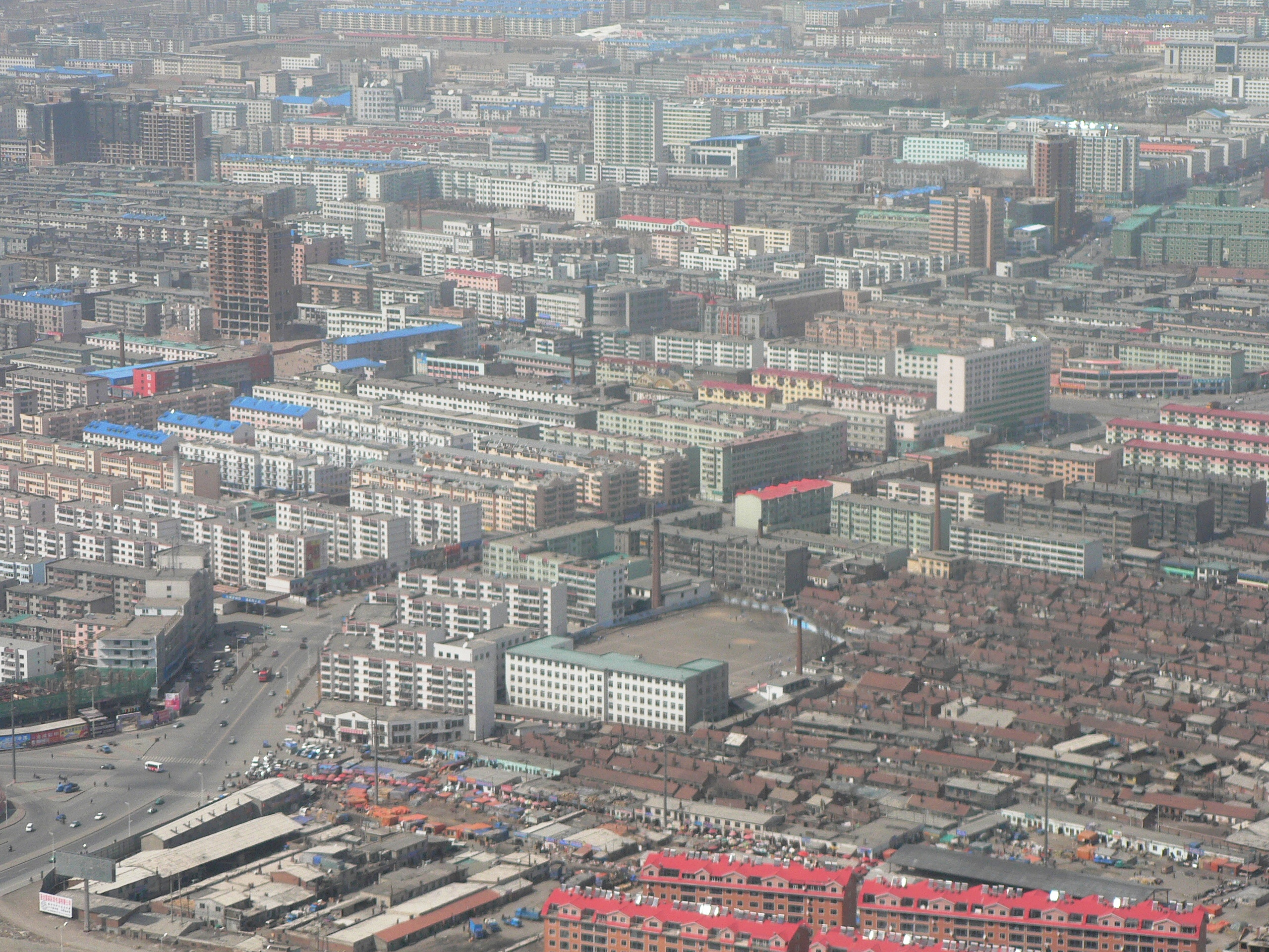 aP1150057